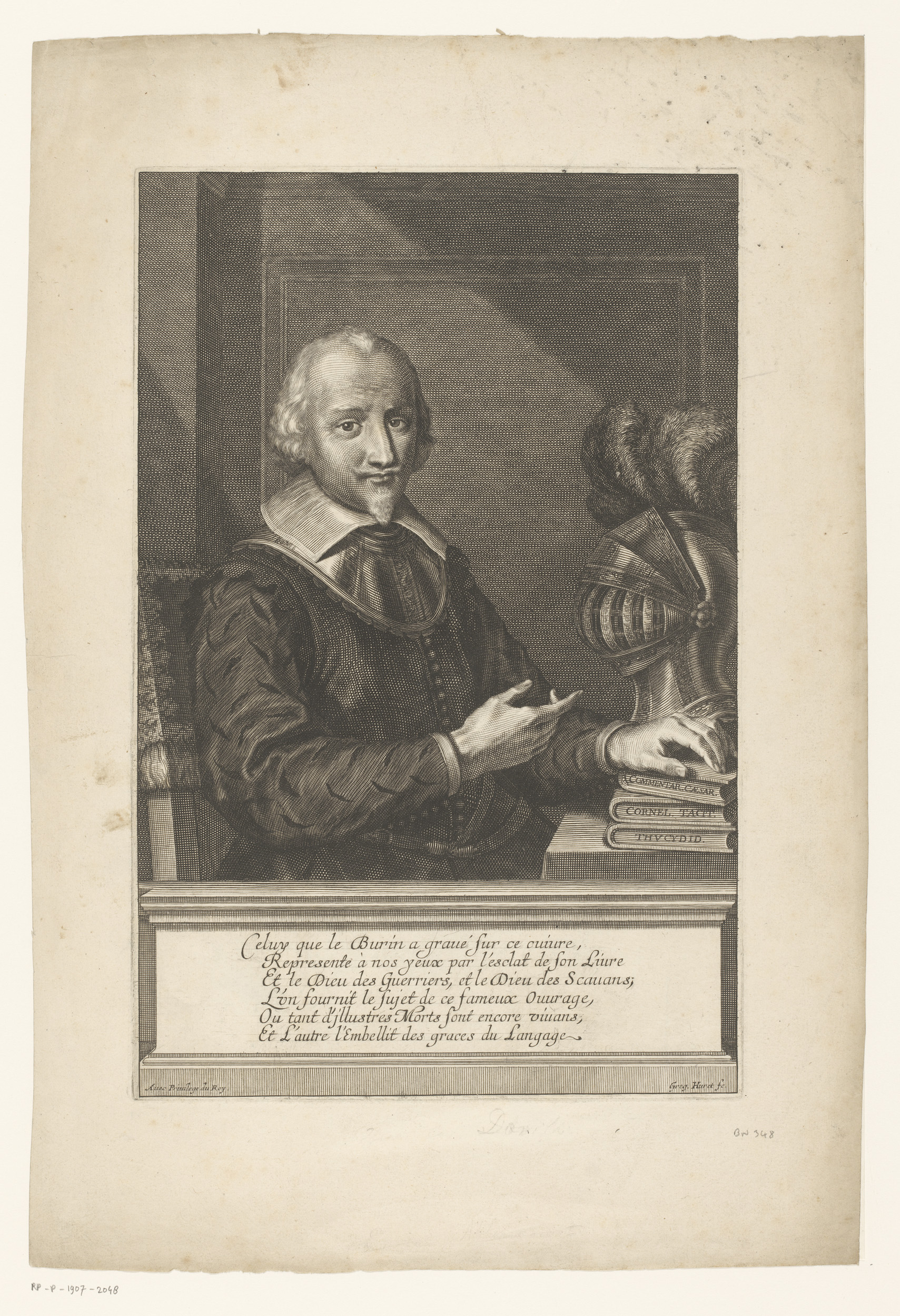 IdentificatieTitel(s): Portret van Arrigo Caterino DavilaObjecttype: prent boekillustratie Objectnummer: RP-P-1907-2048Catalogusreferentie: IFF 17e siècle 348-2(2)Opschriften / Merken: verzamelaarsmerk, verso, gestempeld: Lugt 2228VervaardigingVervaardiger: prentmaker: Grégoire Huret (vermeld op object)uitgever: Pierre Rocoletverlener van privilege: Lodewijk XIV (koning van Frankrijk) (vermeld op object)Plaats vervaardiging: prentmaker: Frankrijkuitgever: Parijsverlener van privilege: FrankrijkDatering: 1644Materiaal: papier Techniek: graveren (drukprocedé)Afmetingen: plaatrand: h 319 mm × b 209 mmToelichtingPrent gebruikt voor: Baudoin, Jean. Histoire des Guerres civiles de France. Parijs: Rocolet, 1644.OnderwerpWat: historical personsWie: Arrigo Caterino DavilaVerwerving en rechtenVerwerving: aankoop 1905Copyright: Publiek domein